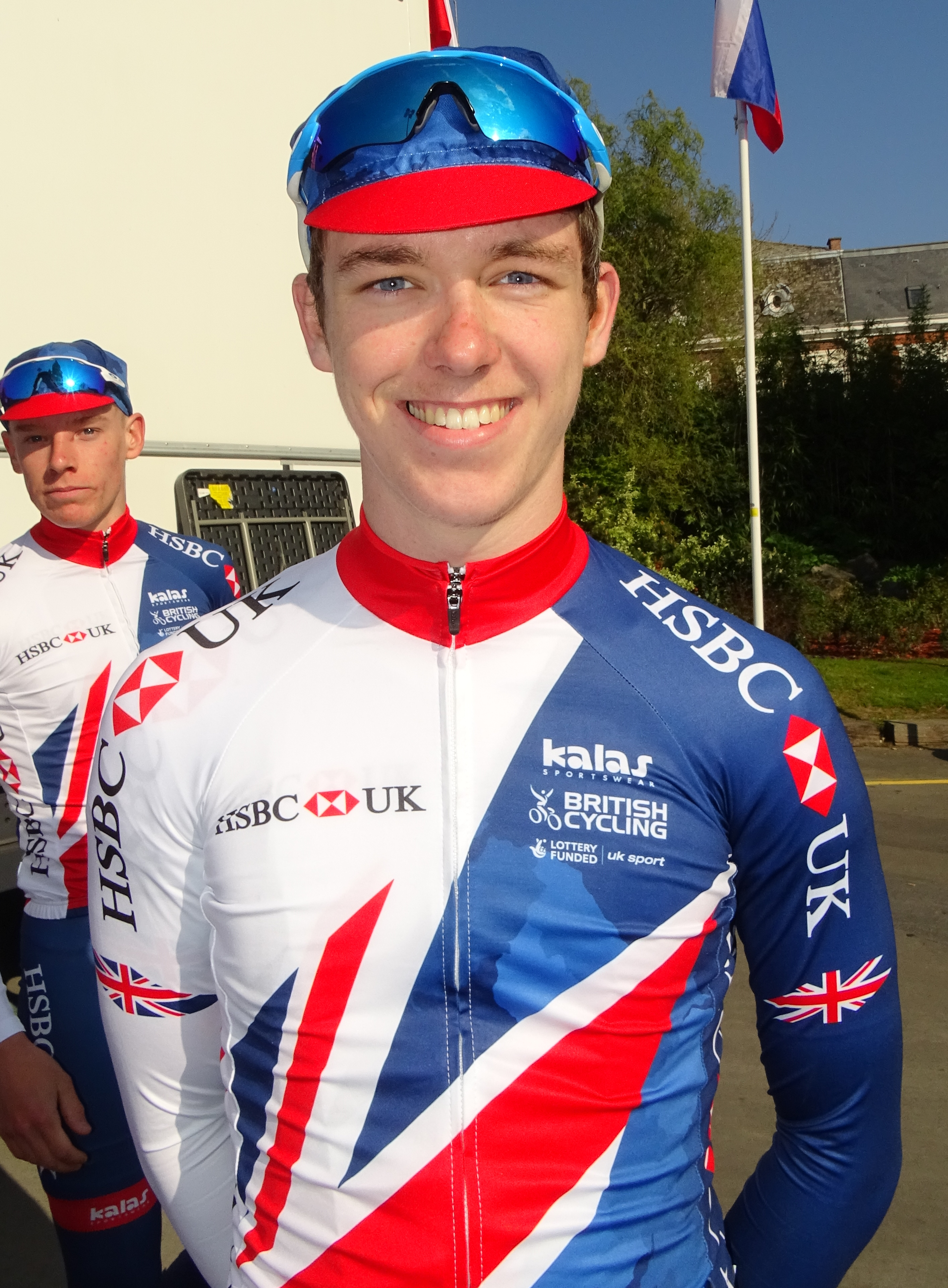 Reportage réalisé le dimanche 9 avril à l'occasion du départ du Paris-Roubaix juniors 2017 à Saint-Amand-les-Eaux, France.